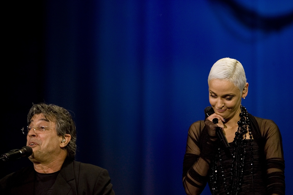 Mariza, fadista portuguesa, e Ivan Lins, cantor, músico e compositor brasileiro.